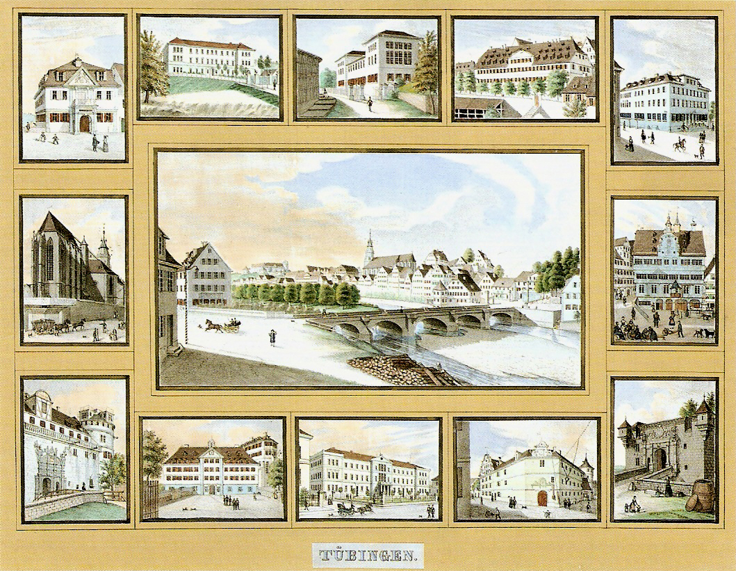 Tübingen. Das Sammelbild mit 12 Nebenansichten (aquarelierte Lithographie, 41 × 52 cm); Schefold 9358